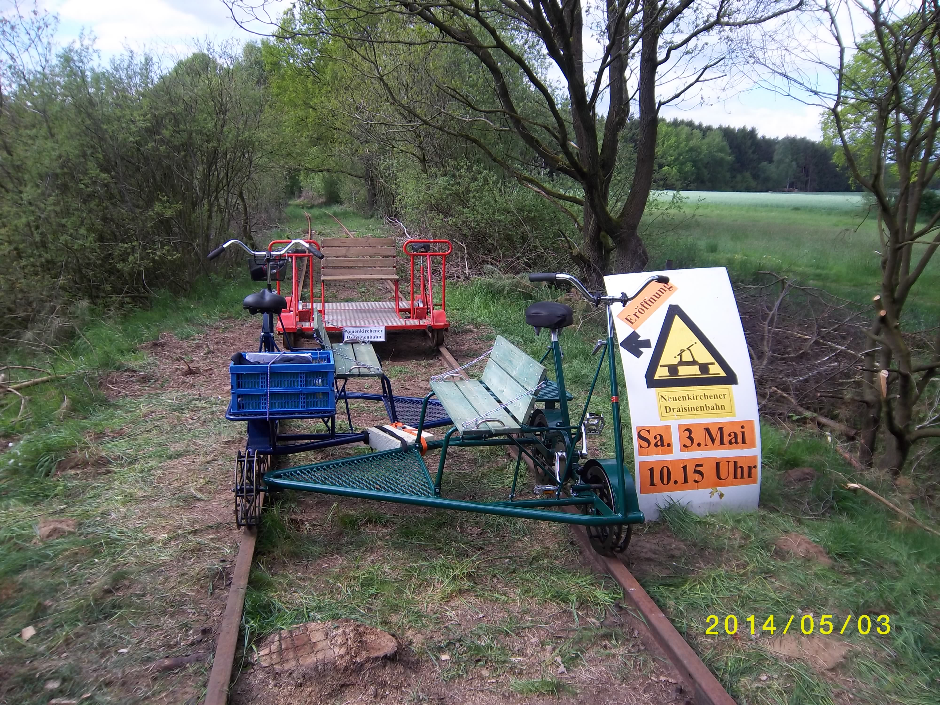 Hier auf dem Bild erkennbar, wurde am 3.5.2014 die Neuenkirchener Draisinenbahn eröffnet. Das Schienenfahrrad war eine Leihgabe von der Böhmetalbahn und die beiden schwedischen Fahrraddraisinen waren eine Leihgabe von den Hamburgischen Draisinenbahnfreunden, mittlerweile befinden sich die beiden schwedischen Fahrraddraisinen in Wietzendorf (beim dortigen Besitzer).